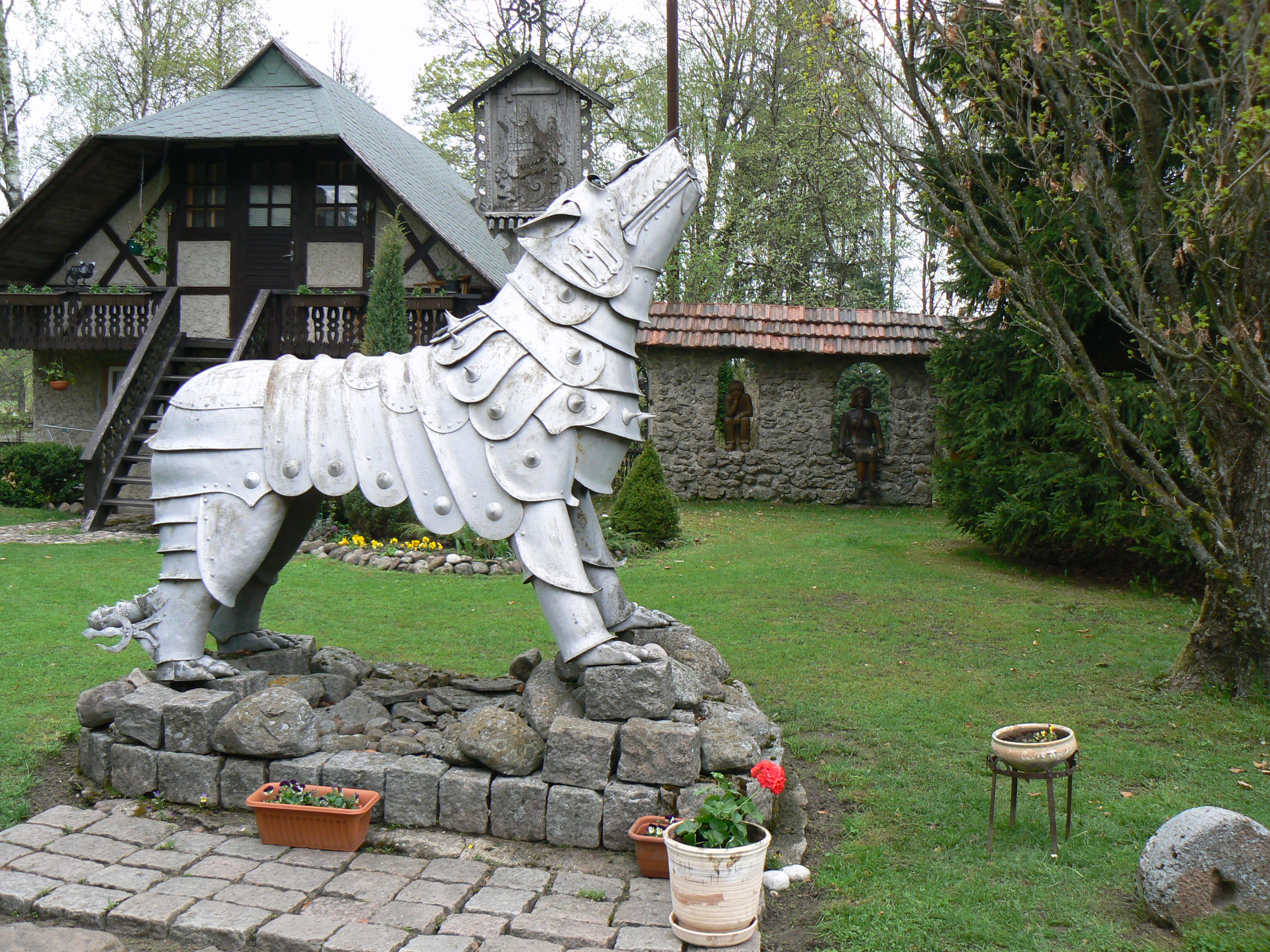 Majorův vyjící Železný Vlk (Geležinis Vilkas) (viz Gediminův sen před založením Vilniusu)